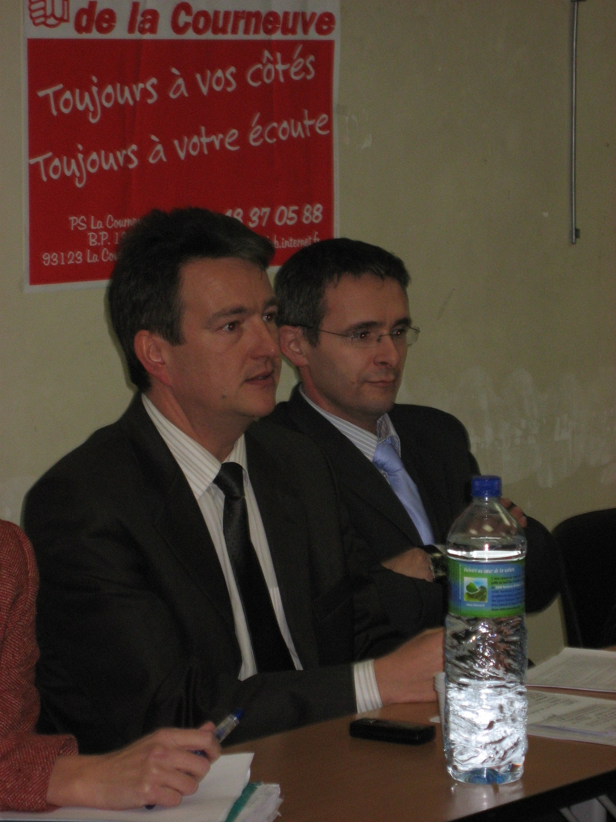 Pascal Popelin, vice-président du SEDIF avec Stéphane Troussel, vice-président du Conseil général de Seine-Saint-Denis.